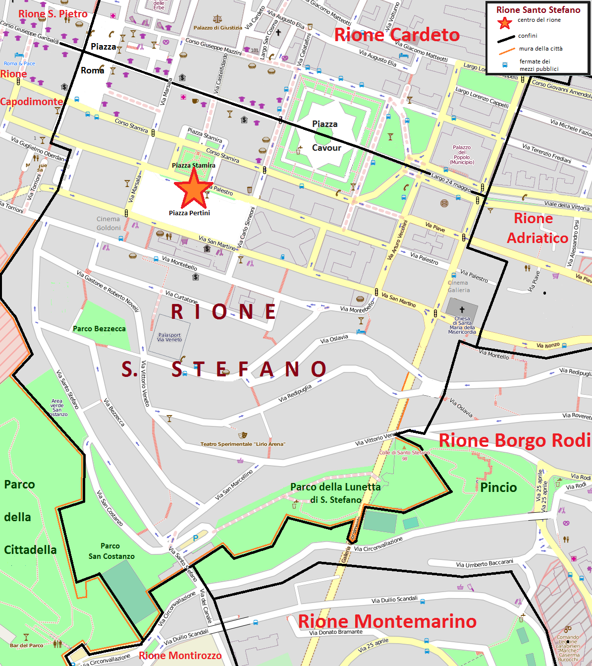 Mappa del rione Santo Stefano di Ancona, con i confini, le vie, le piazze e i parchi.